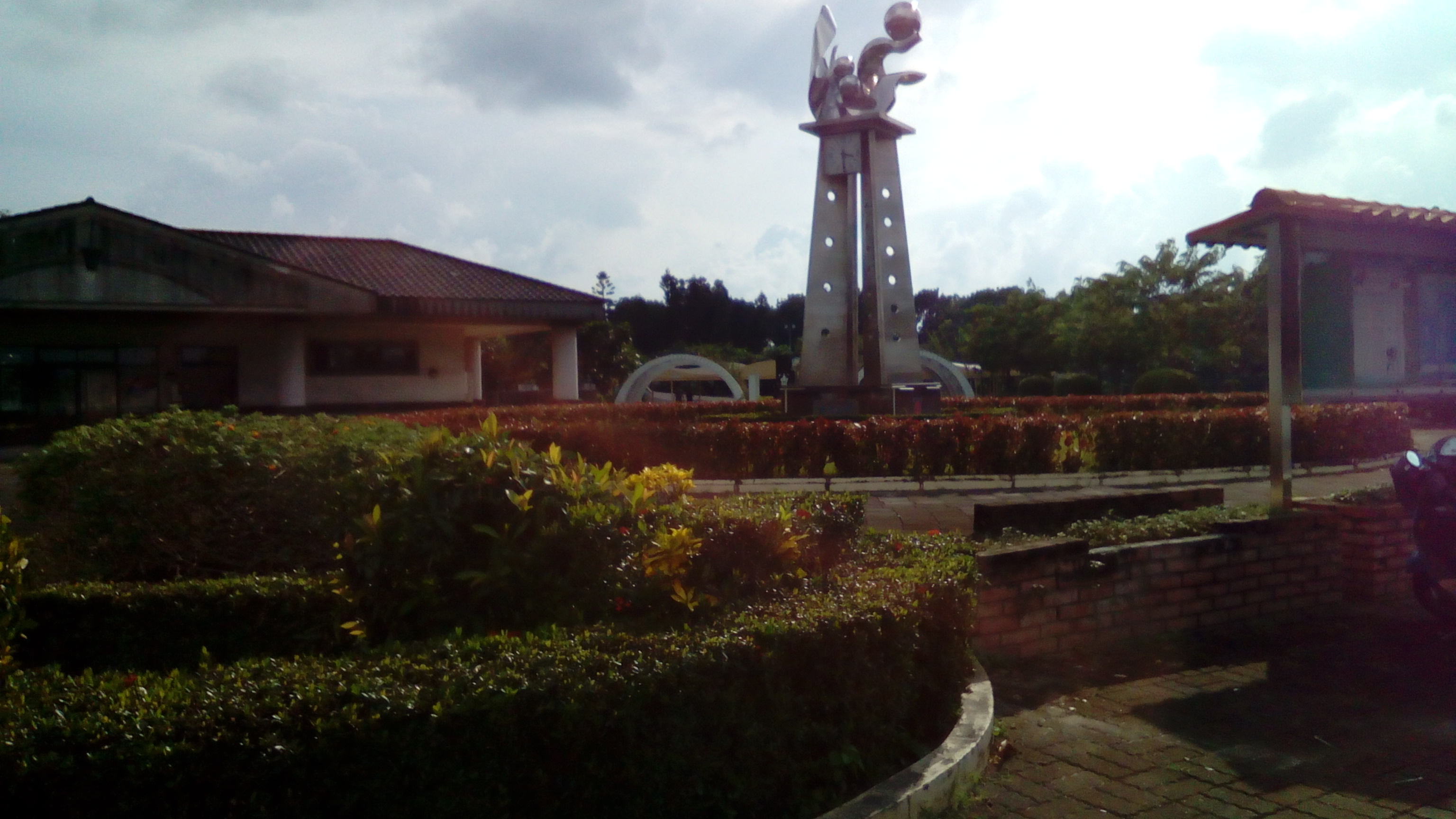 位於萬丹國中旁